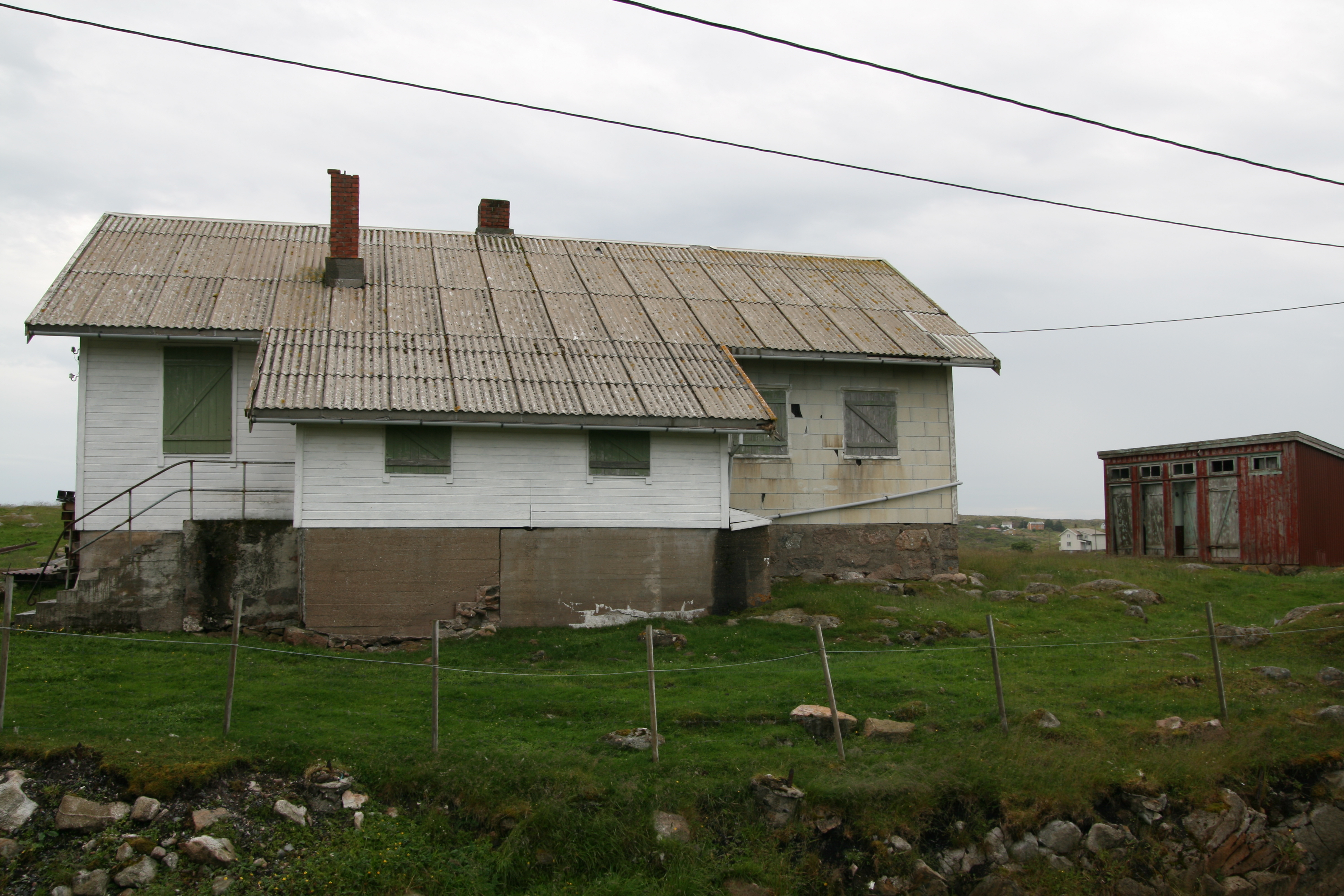 Gamle Dyrø skole